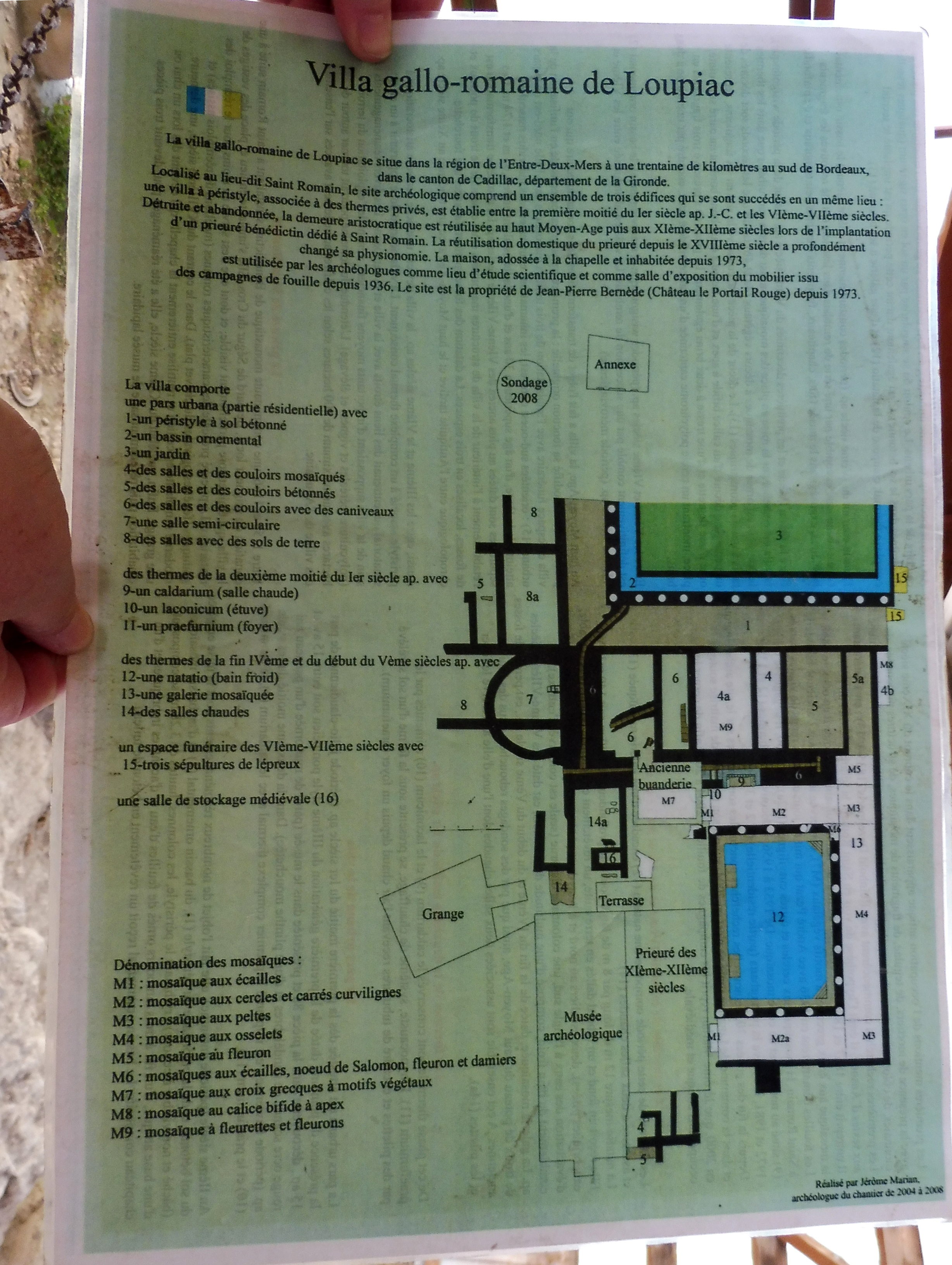 Plan des vestiges fouillés, Jérôme Marian, 2008.